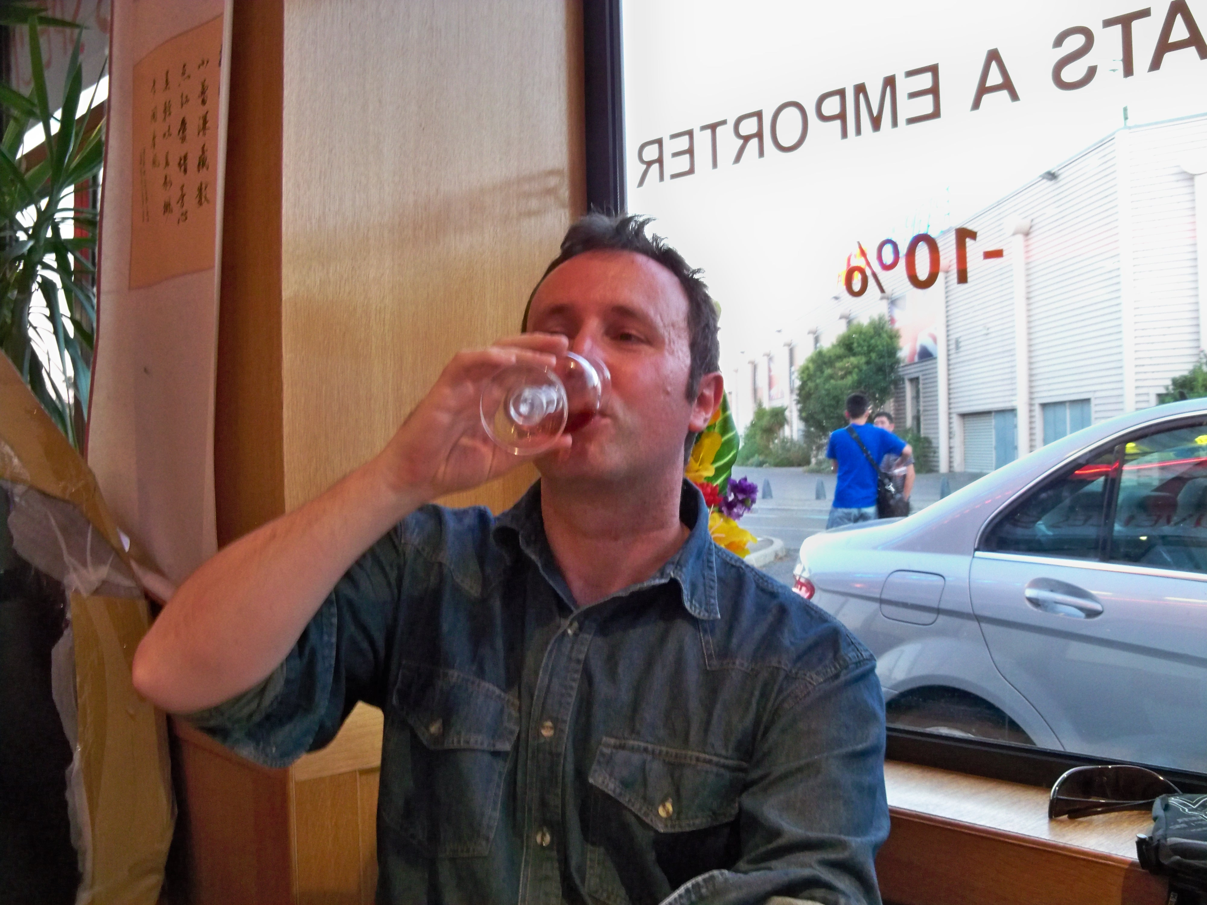 Dégustation de vin